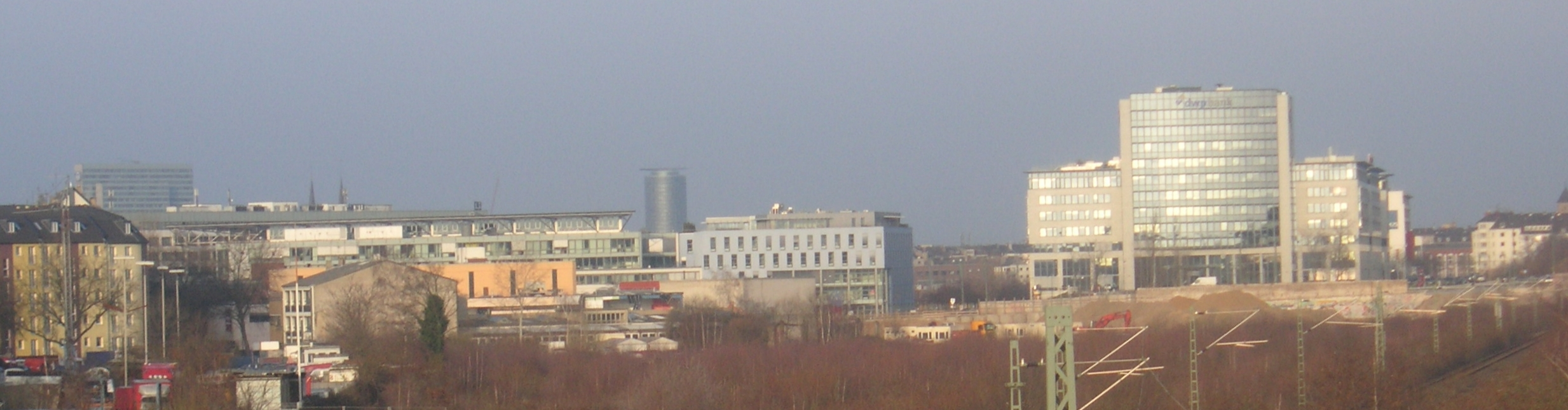 Panorama Düsseldorf Oberbilk von der Mindener Straße Richtung Nordwest